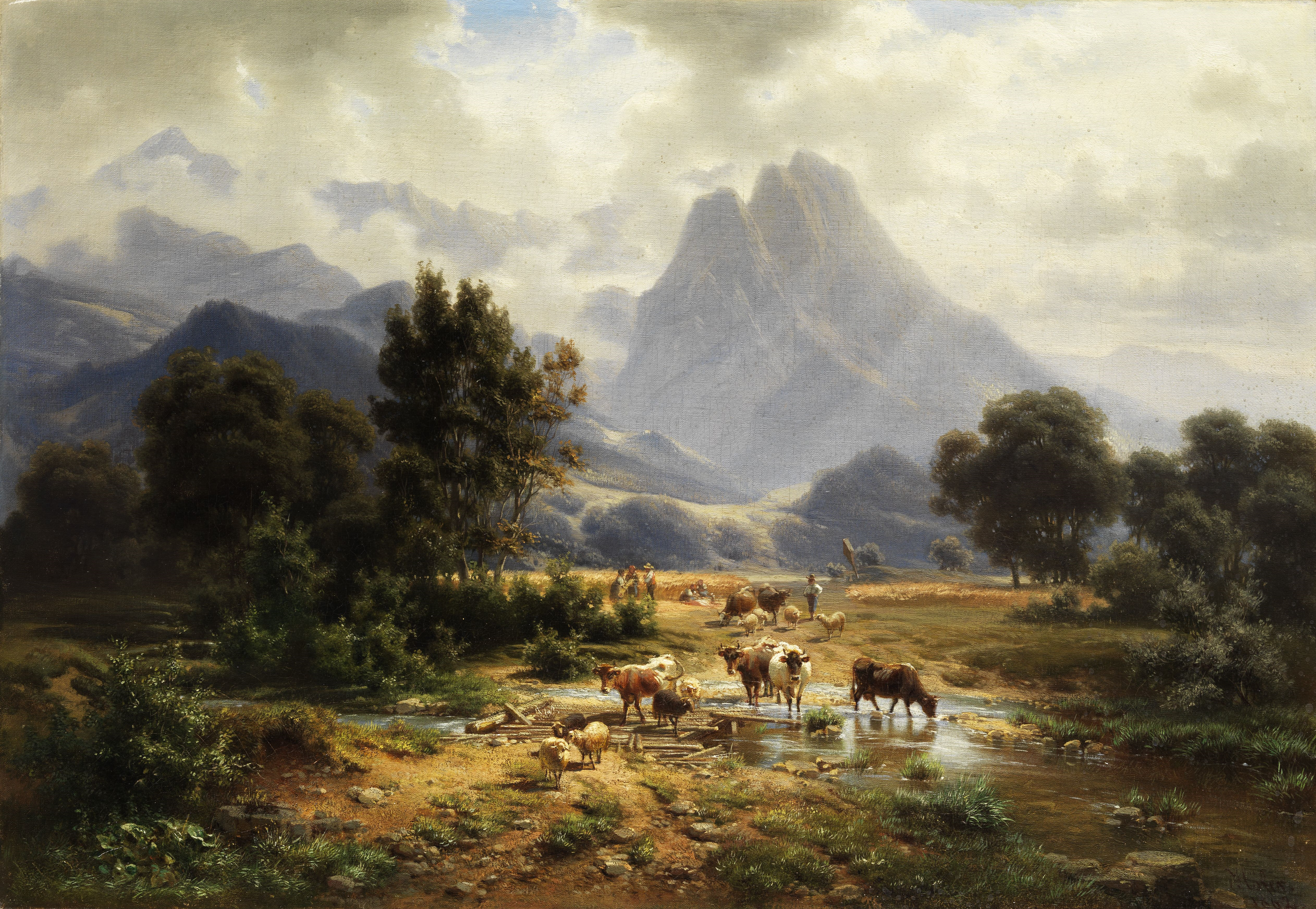 Gebirgslandschaft. Öl auf Leinwand. 51 x 74 cm.